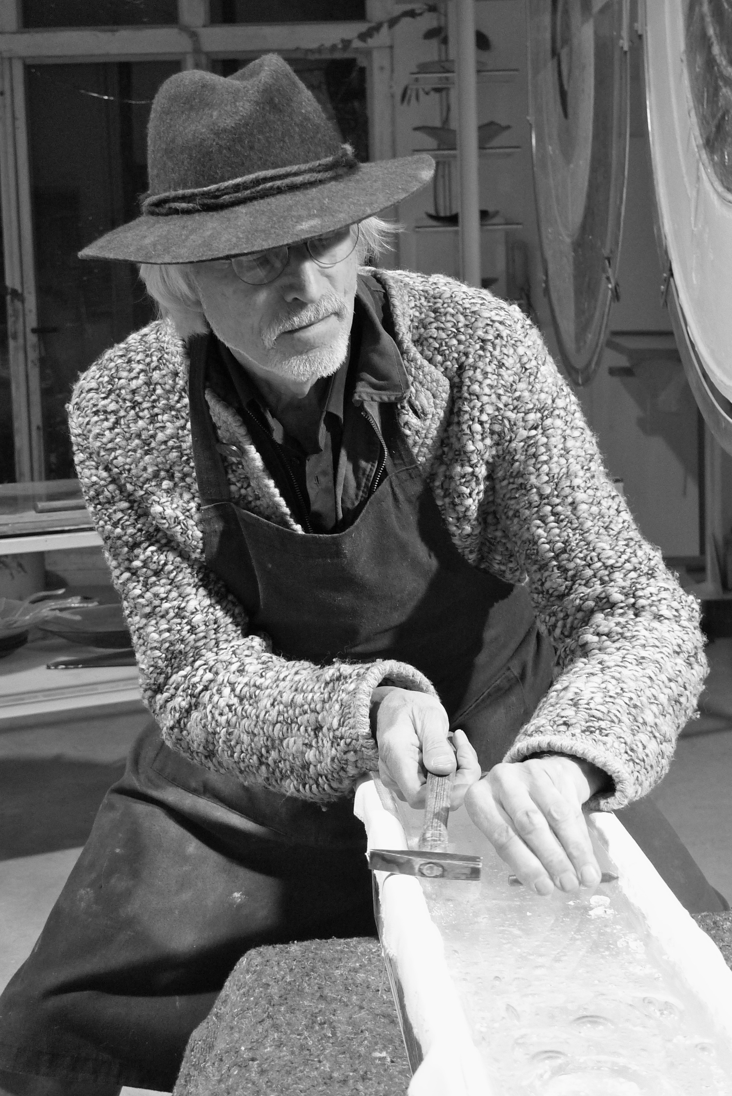 Glaskünstler Florian Lechner bearbeitet eine Stele aus Schmelzglas mit Hammer und Meißel